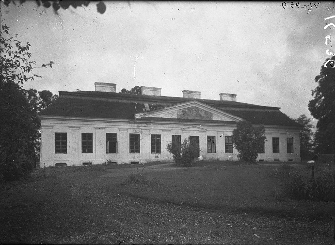 Беларуская (тарашкевіца): Ёды (Jody), палац Лапацінскіх (Łapacinski)